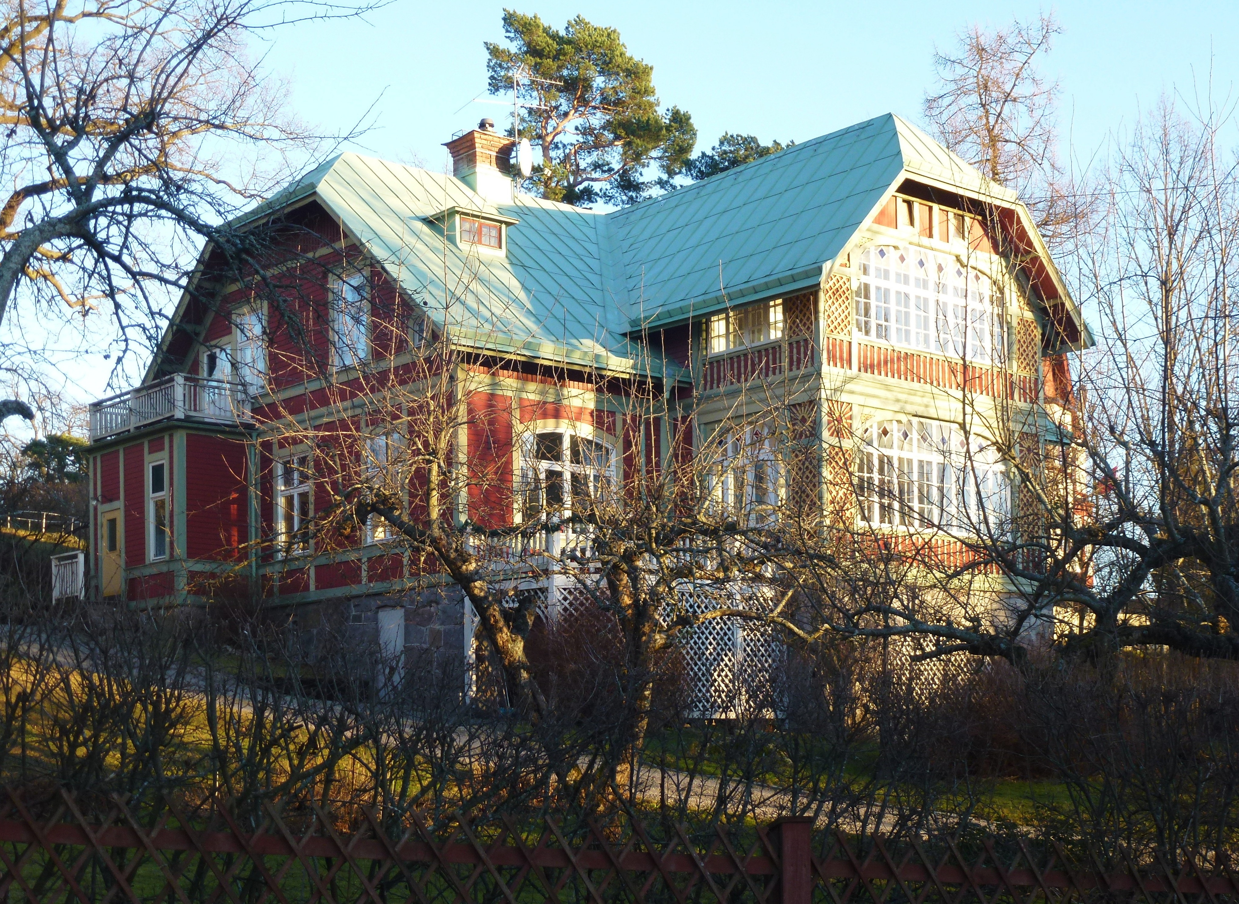 Villa Ransäter, Skandiavägen 10, Djursholm, arkitekt Erik Lundroth. Byggherre var Emil Egnell, en av Djursholms AB:s grundare.